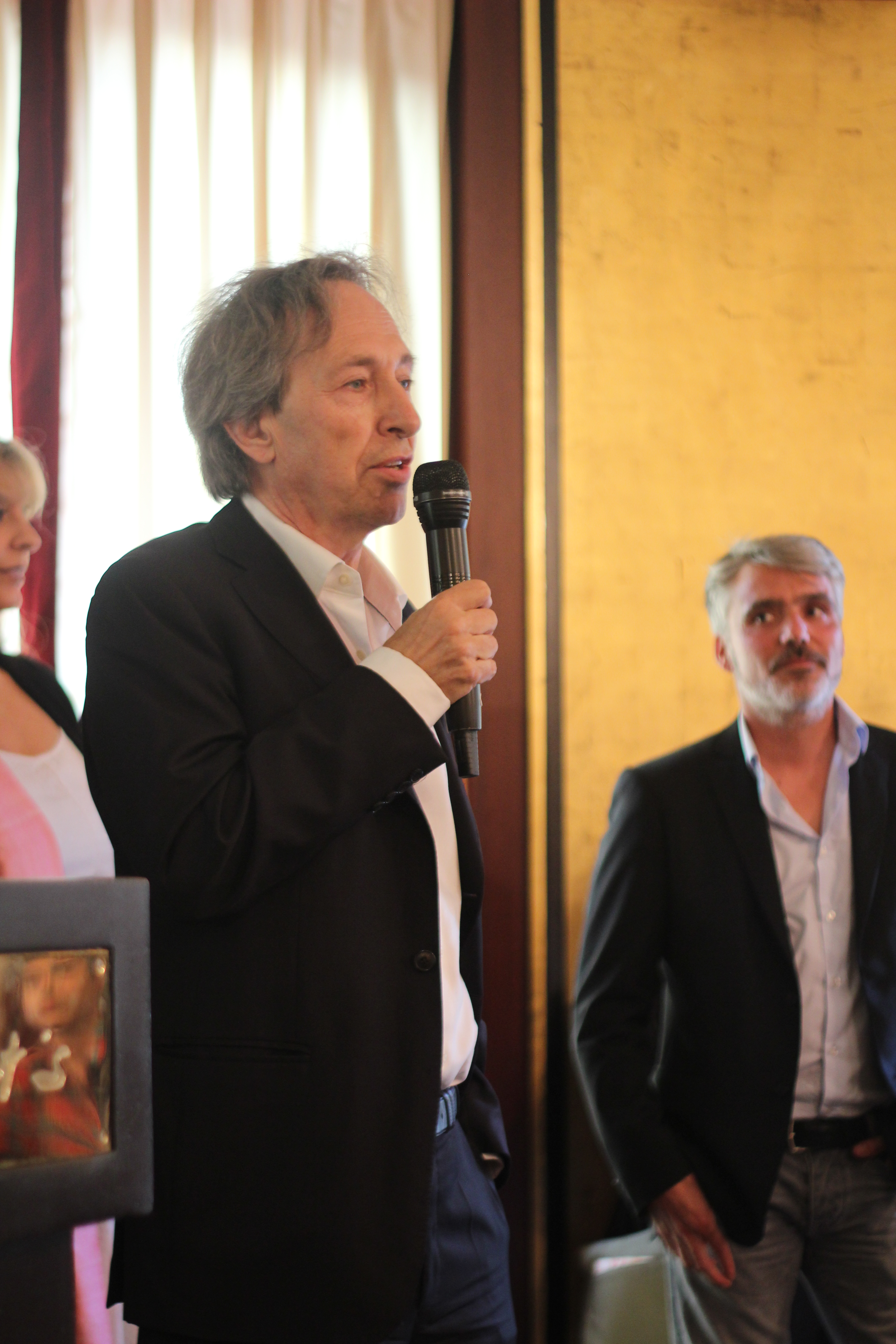 Pascal Bruckner - Prix Marcel Pagnol au Fouquet's